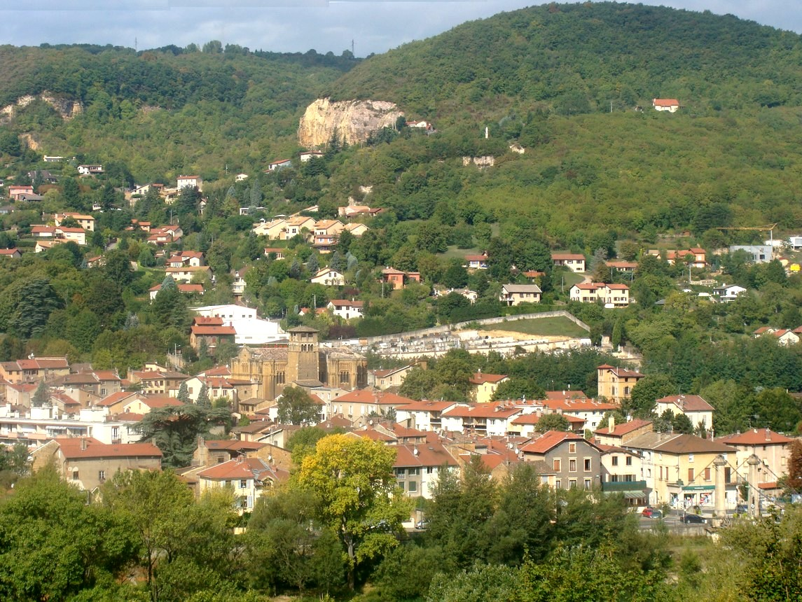 Vue générale de Couzon-au-Mont-d'Or (Rhône) : le village est massé en bas (au bord de la Saône), dominé par l'église. Plus haut, à droite de la falaise, on aperçoit la statue de la Madone.